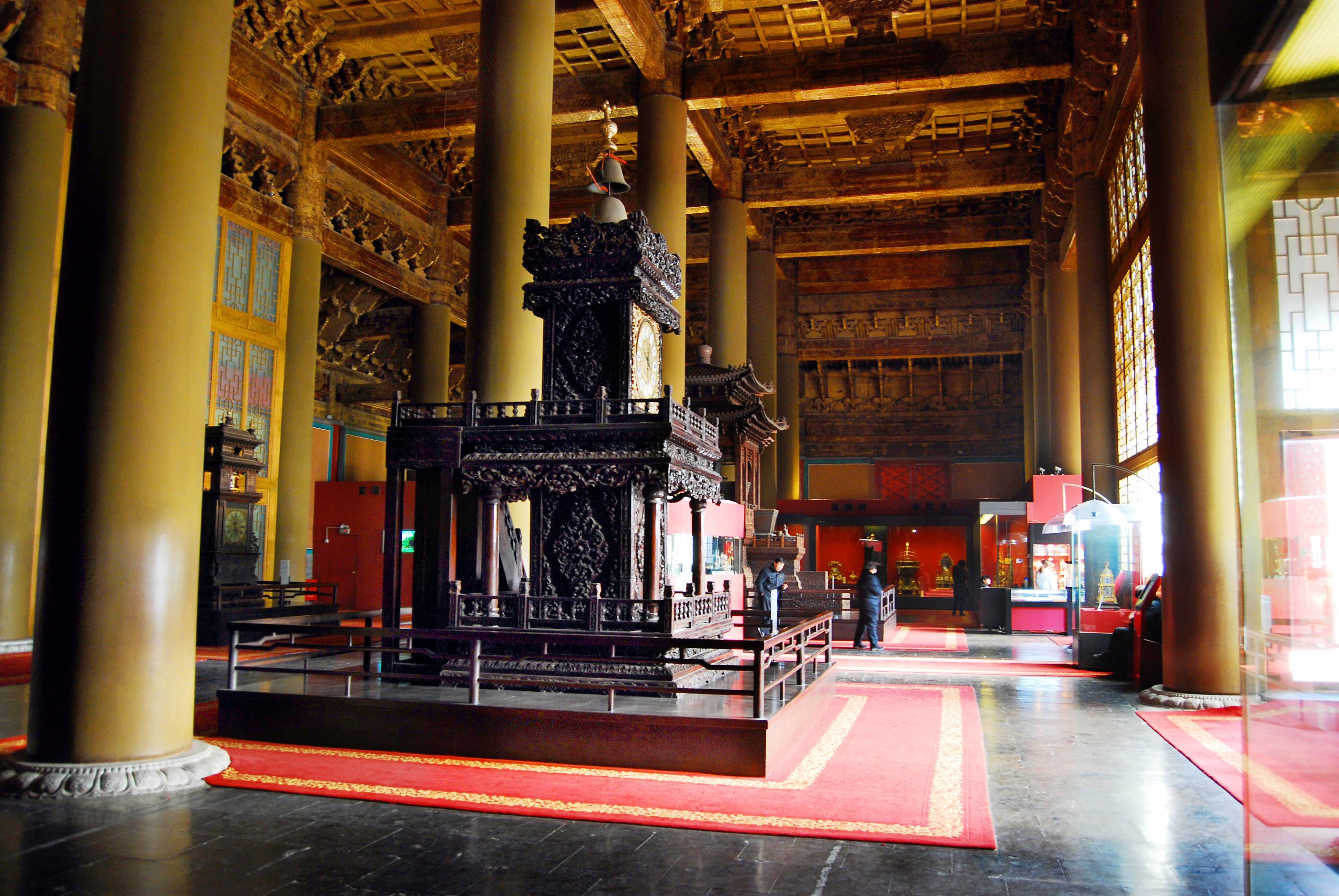 Forbidden City